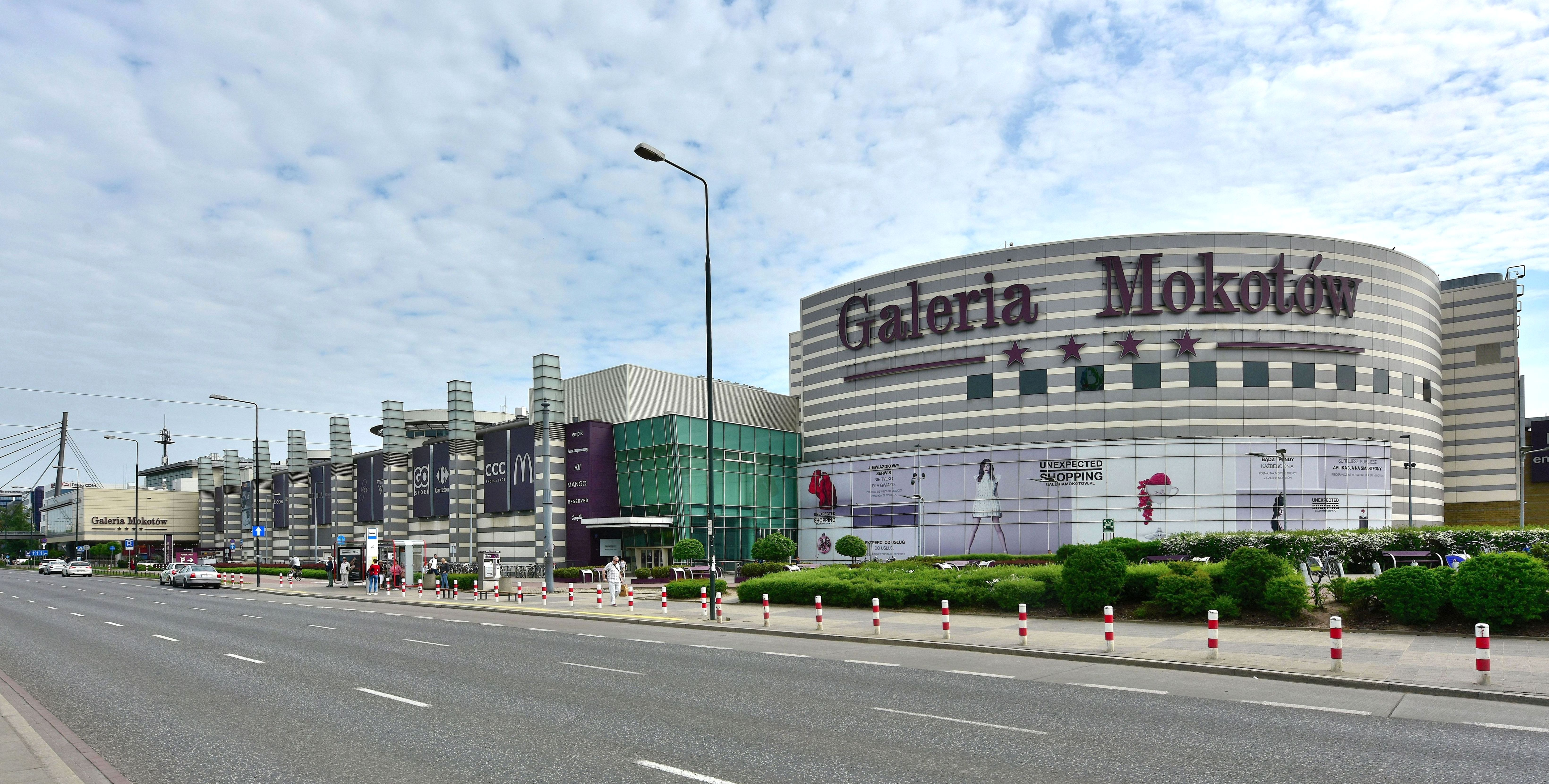 Galeria Mokotów w Warszawie